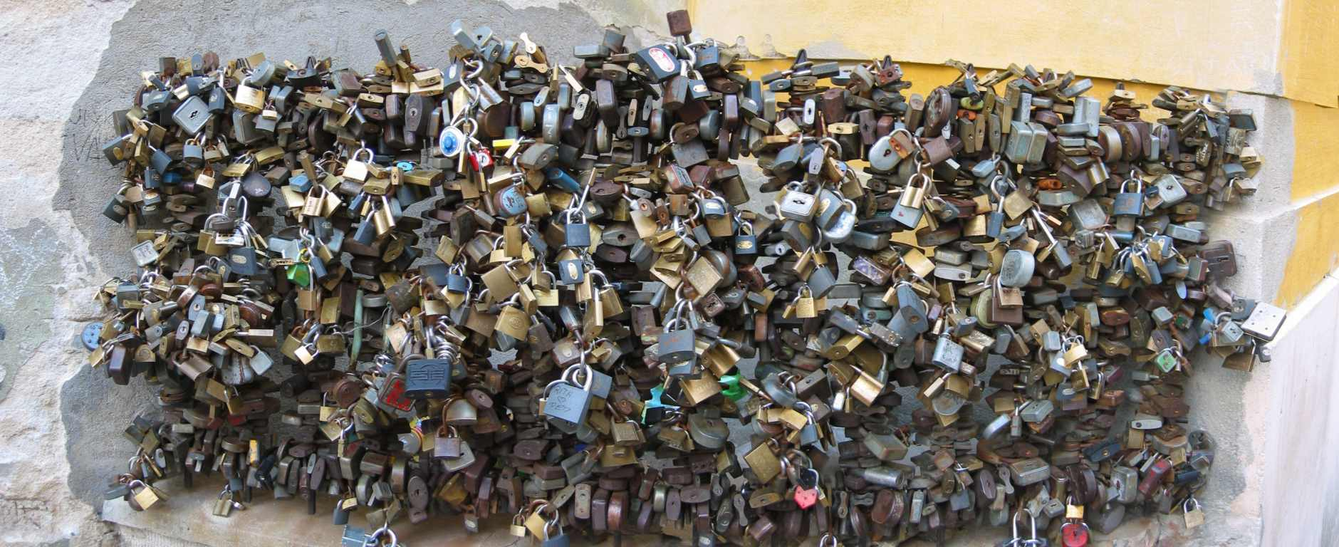 Ein Tor in Pécs (Ungarn) mit sehr vielen Hängeschlössern